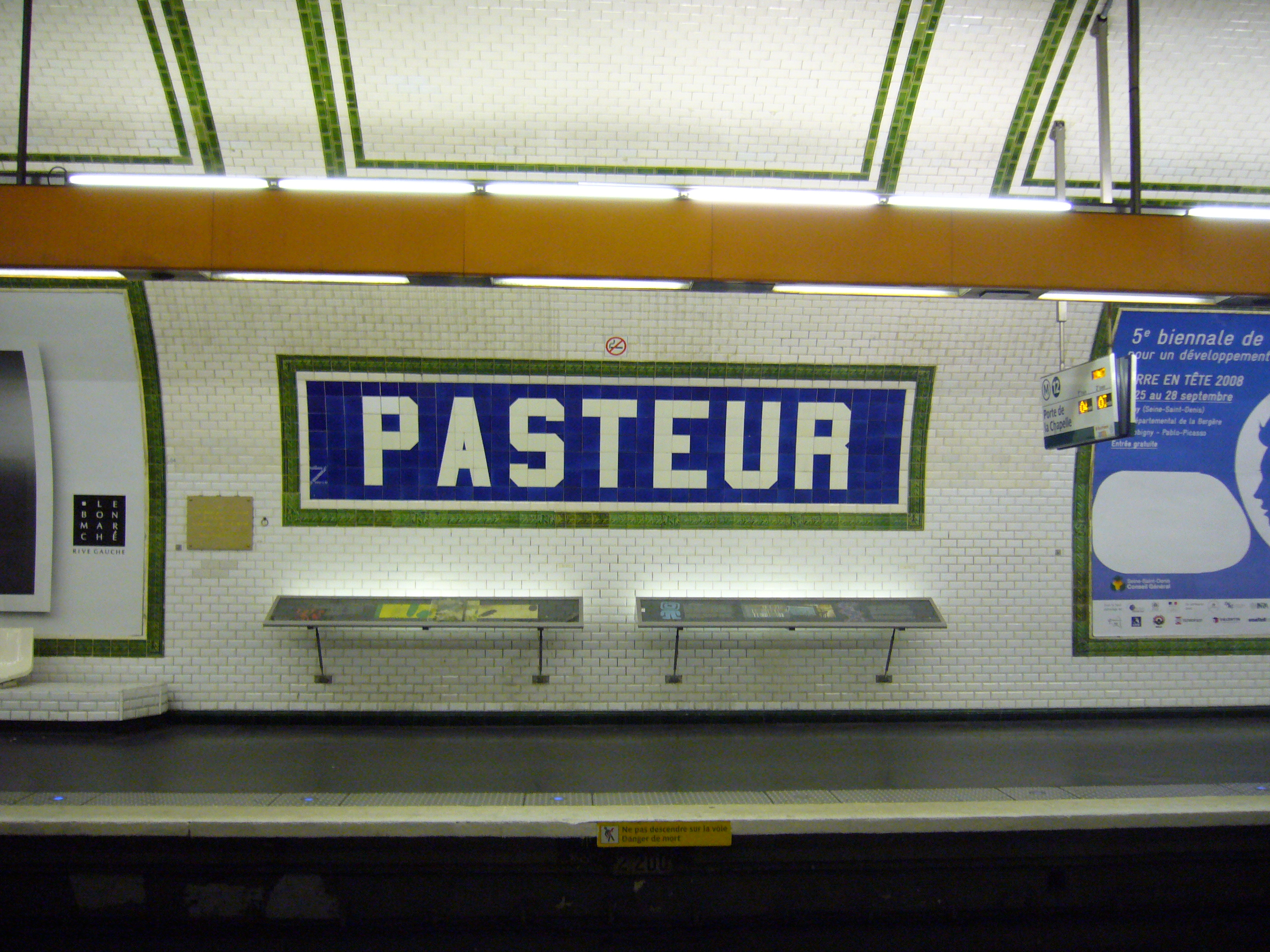 Vue de l'inscription en faïence du nom de la station Pasteur sur la ligne 12 du métro de Paris.